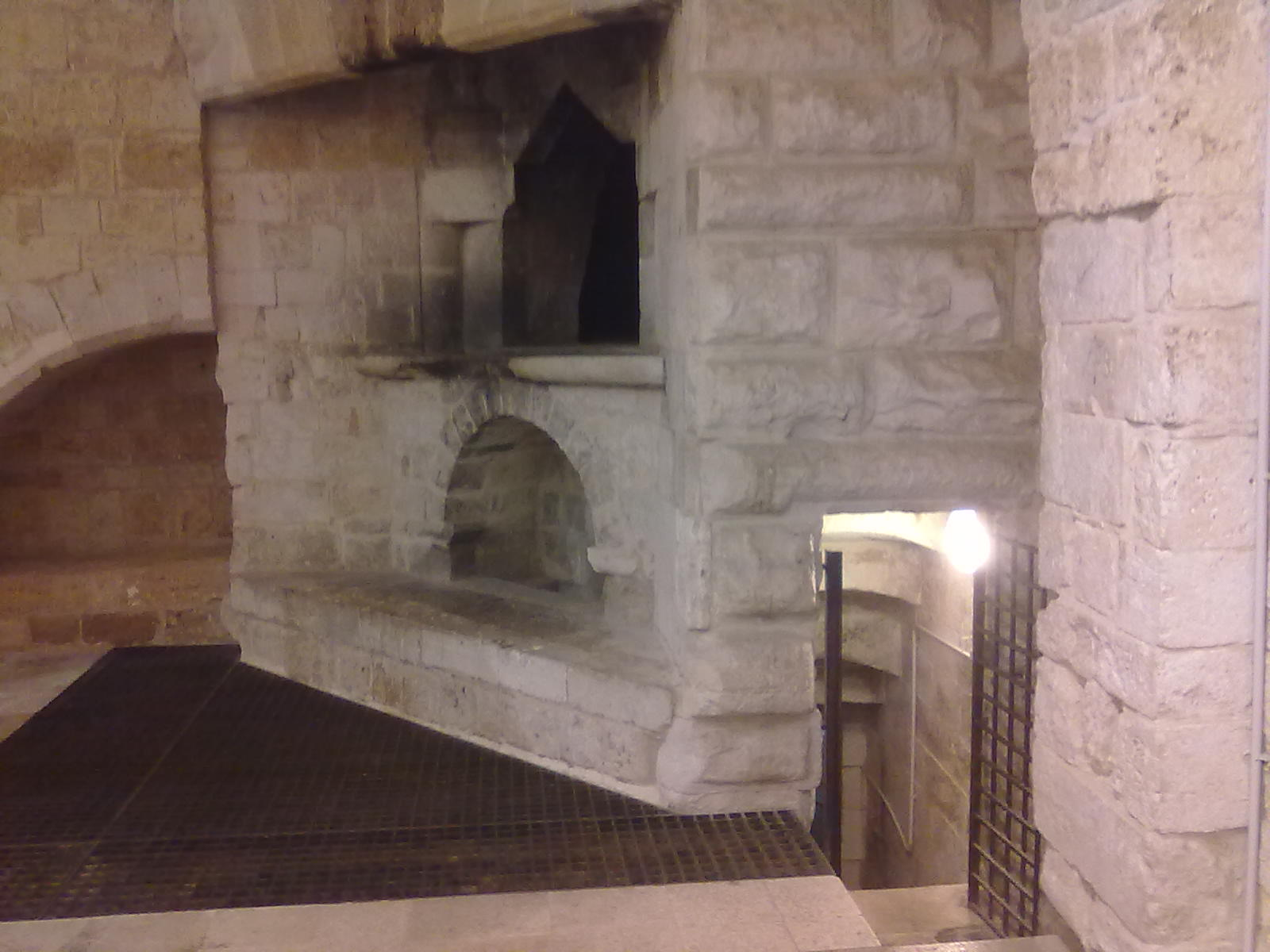 Castello normanno-svevo, Gioia del Colle - La sala del forno con l'accesso alla prigione. Licensing Categoria:Gioia del Colle